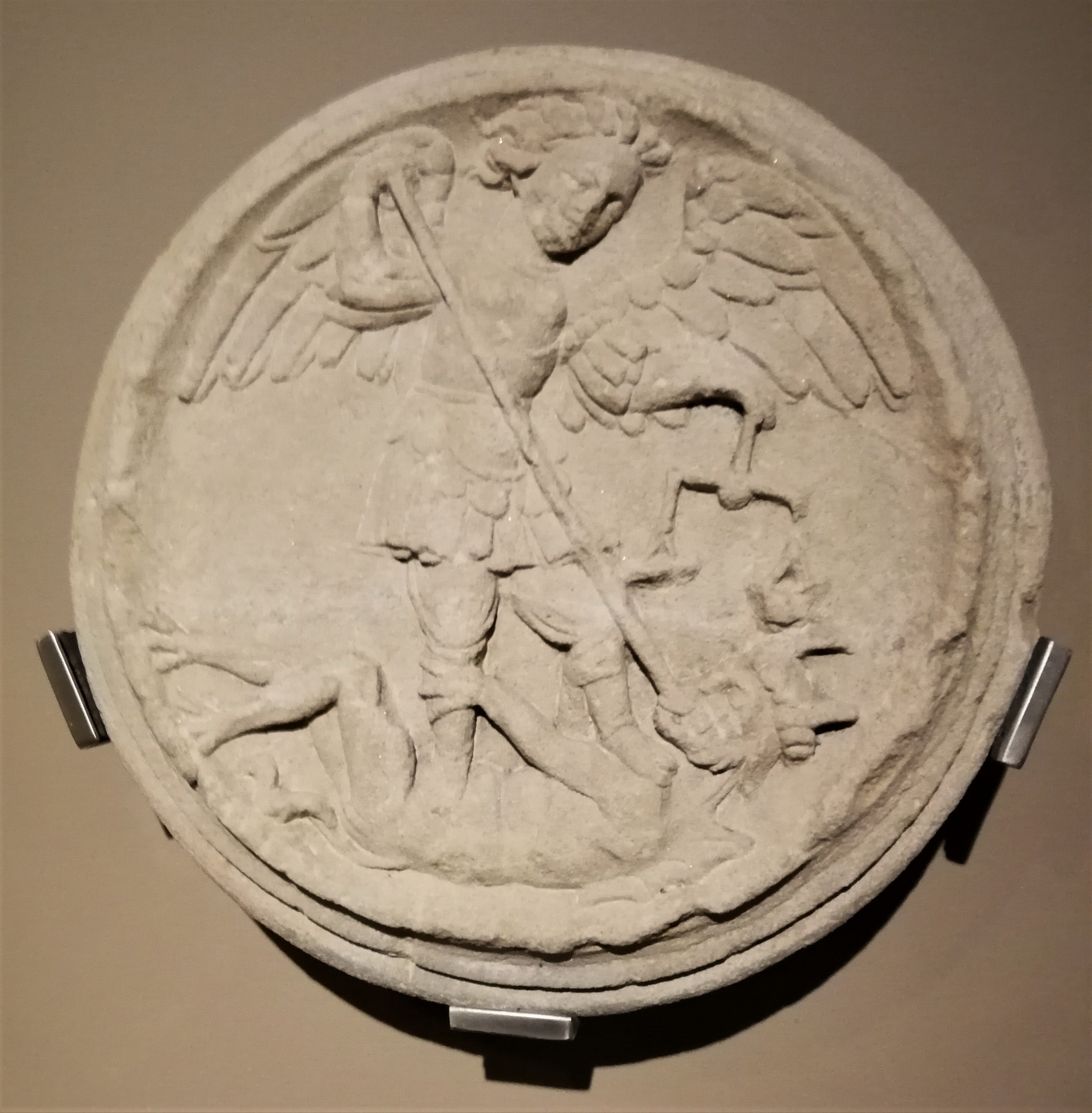 Erzengel Michael tötet den Drachen (Stein, Clau de volta, Katalonien 16. Jhdt.) (Museu episcopal de Vic, Lapidarium)